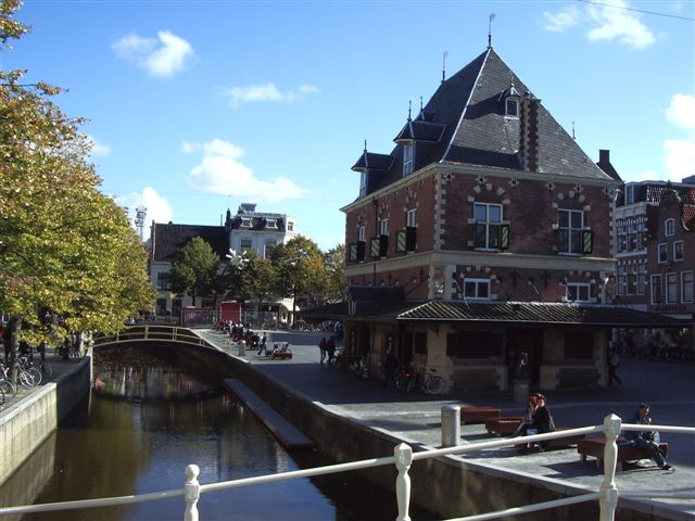 De Waag in de Nieuwstad in Leeuwarden. Foto genomen door Magalhães op 10 oktober 2004